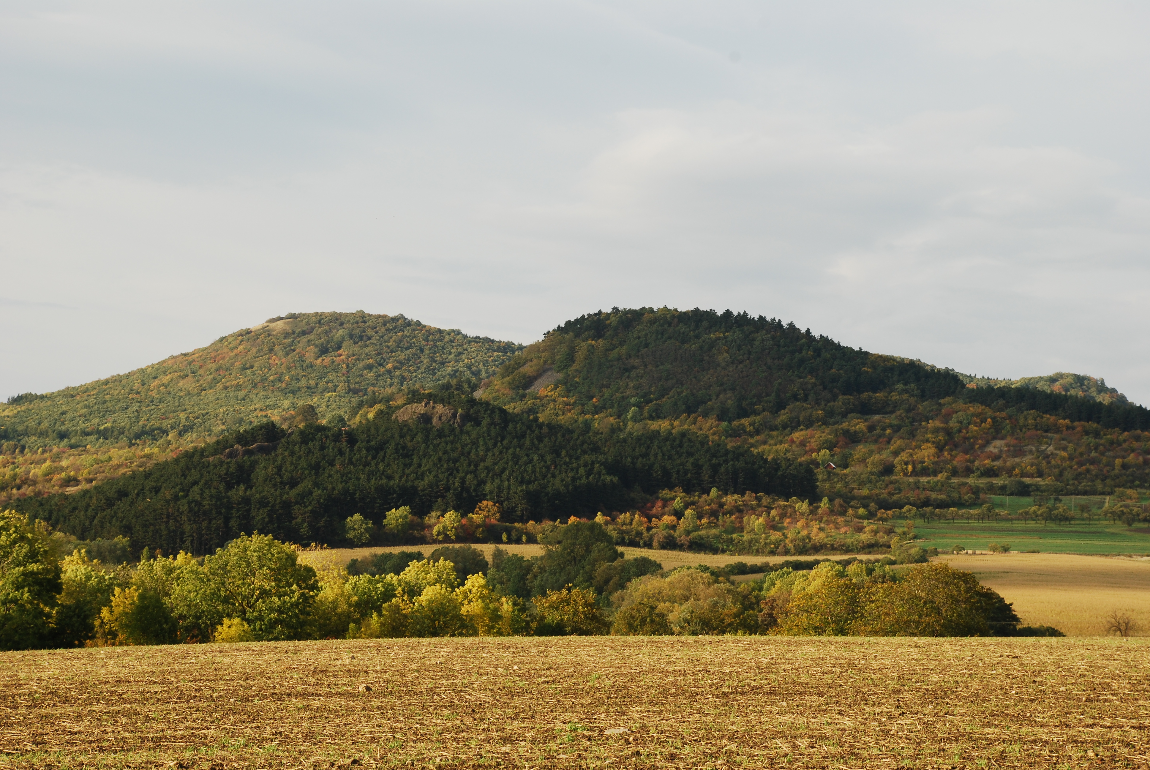 Kuzov v popředí, dále Blešno, na pozadí Solanská hora